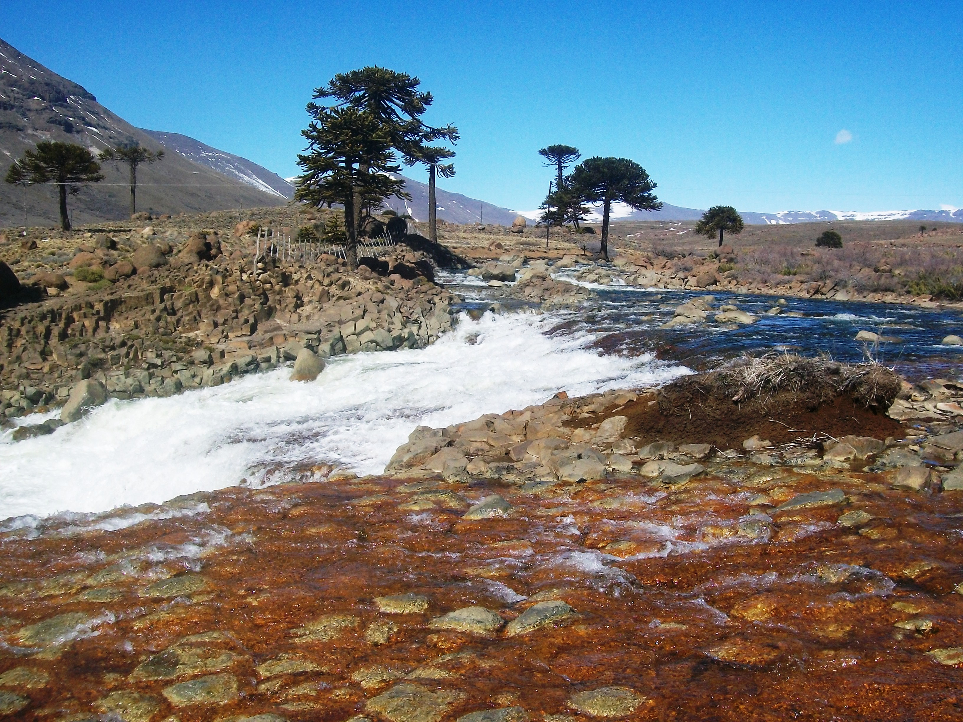 Rio Agrio. Caviahue, Neuquén, Argentina